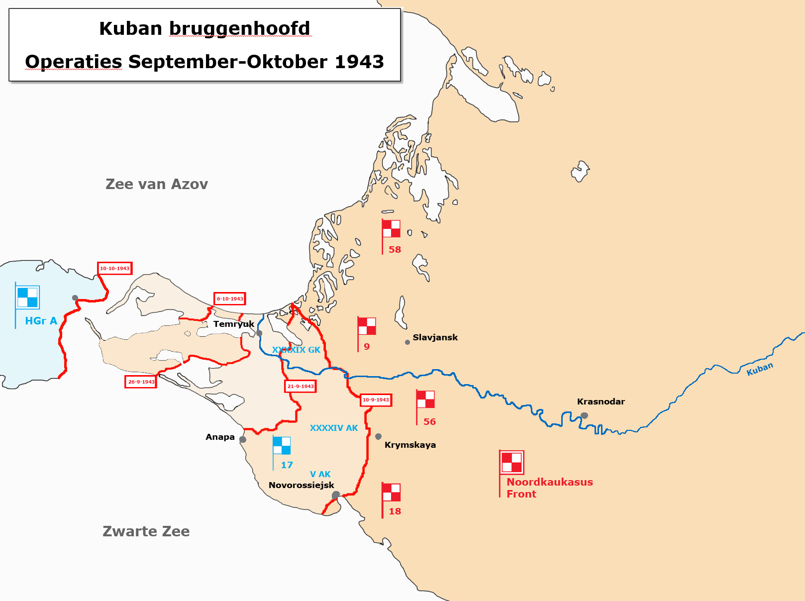 Correctie tov 1e versie: 2 namen korpsen omgewisseld nav terechte opmerking medegebruiker (bedankt!)